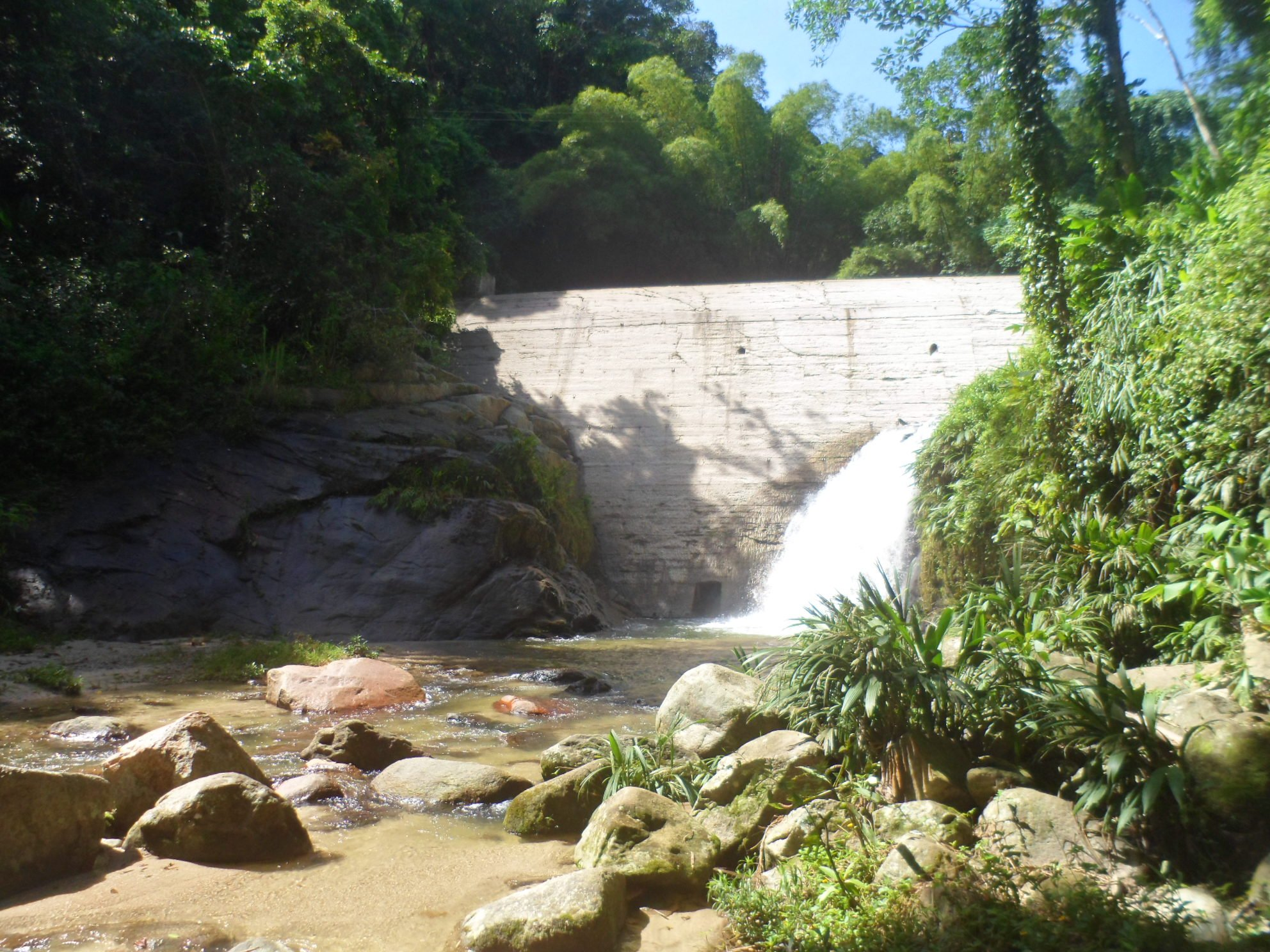 vista frontal